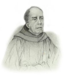 Francisco de Monte Alverne (1784-1858), frade franciscano e teólogo brasileiro.